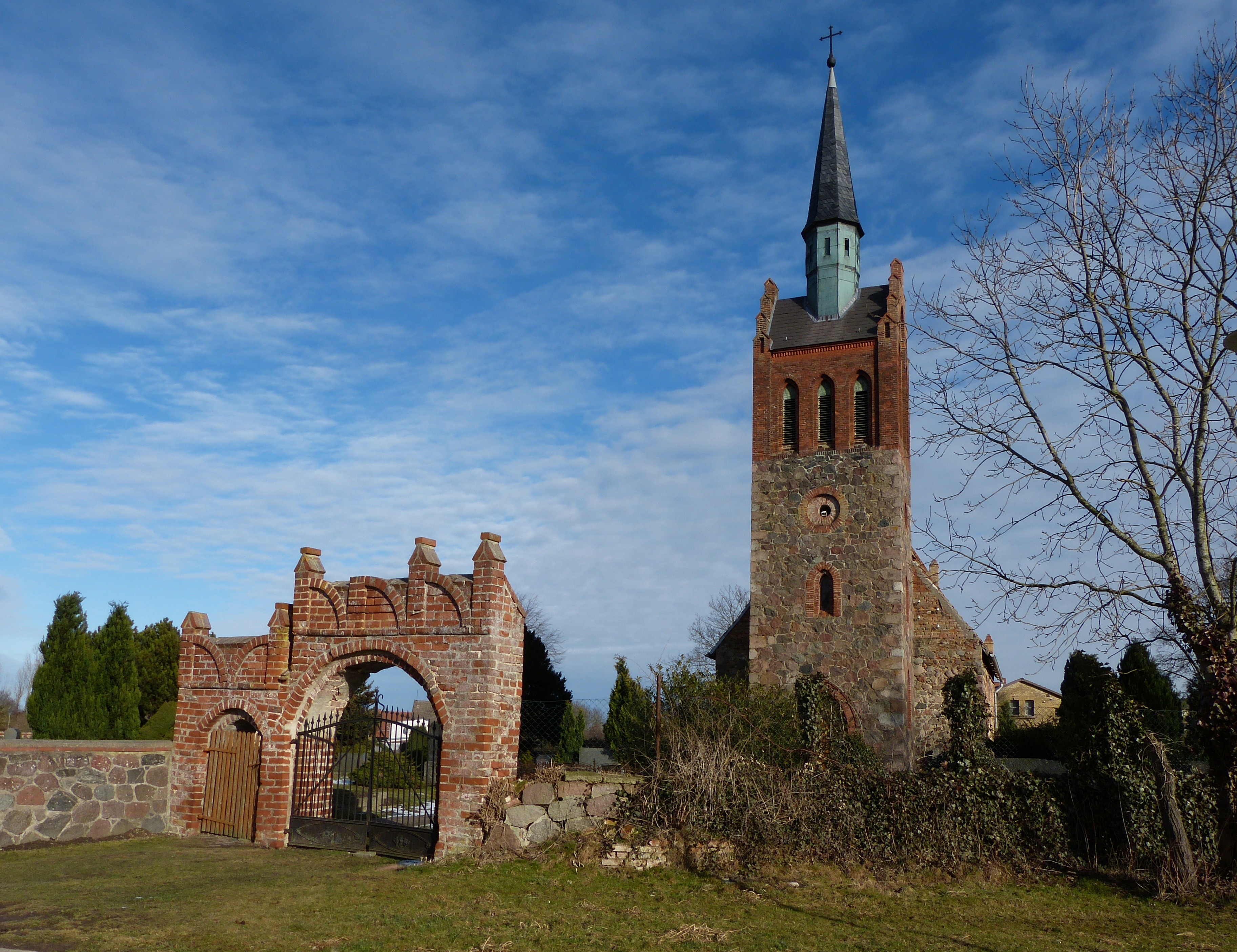 Völschow, Kirchturm, Friedhofsportal